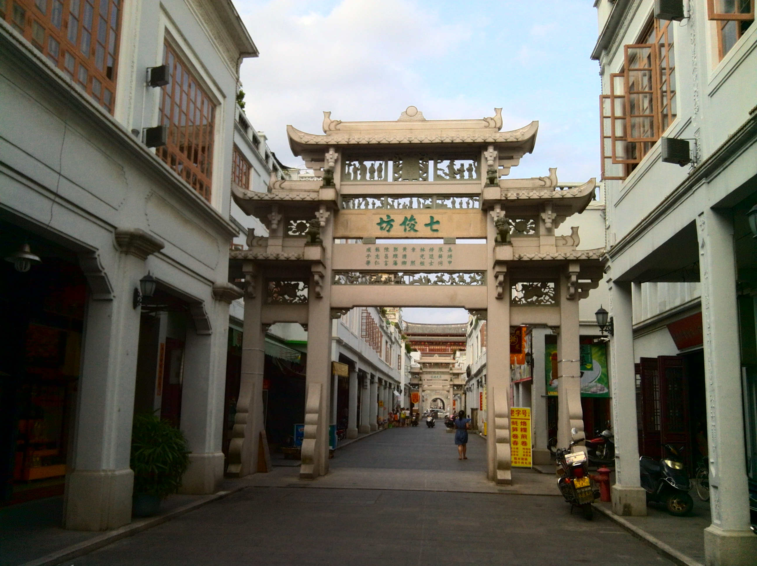 潮州牌坊街七俊坊。